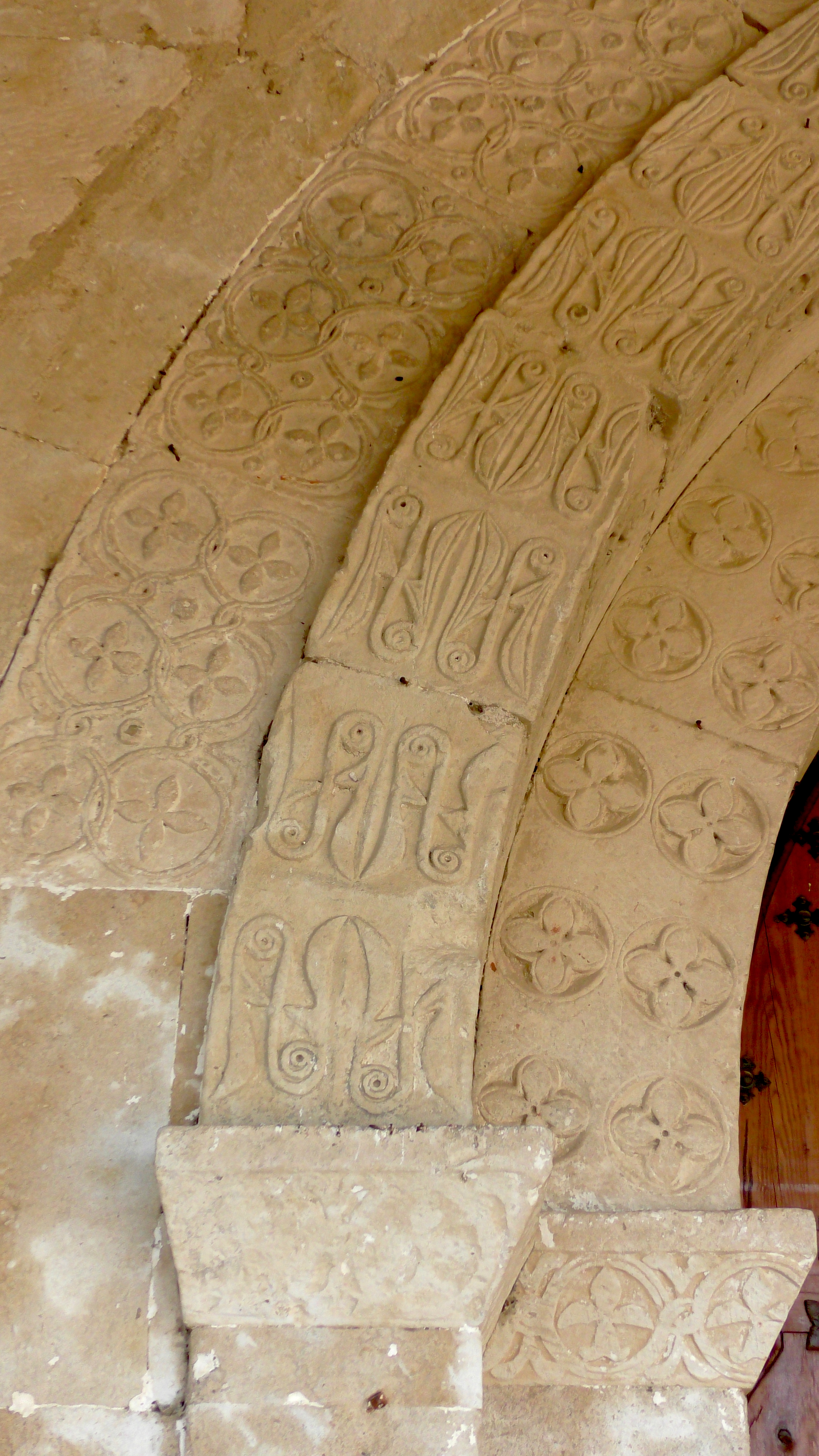 Cuelgamures